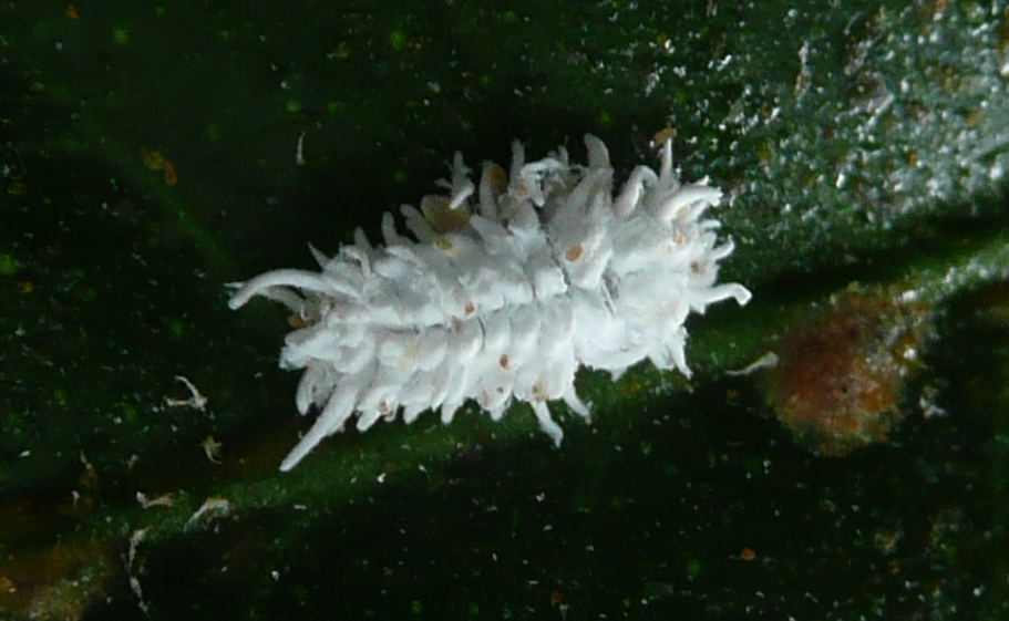 Cryptolaemus montrouzieri Larva